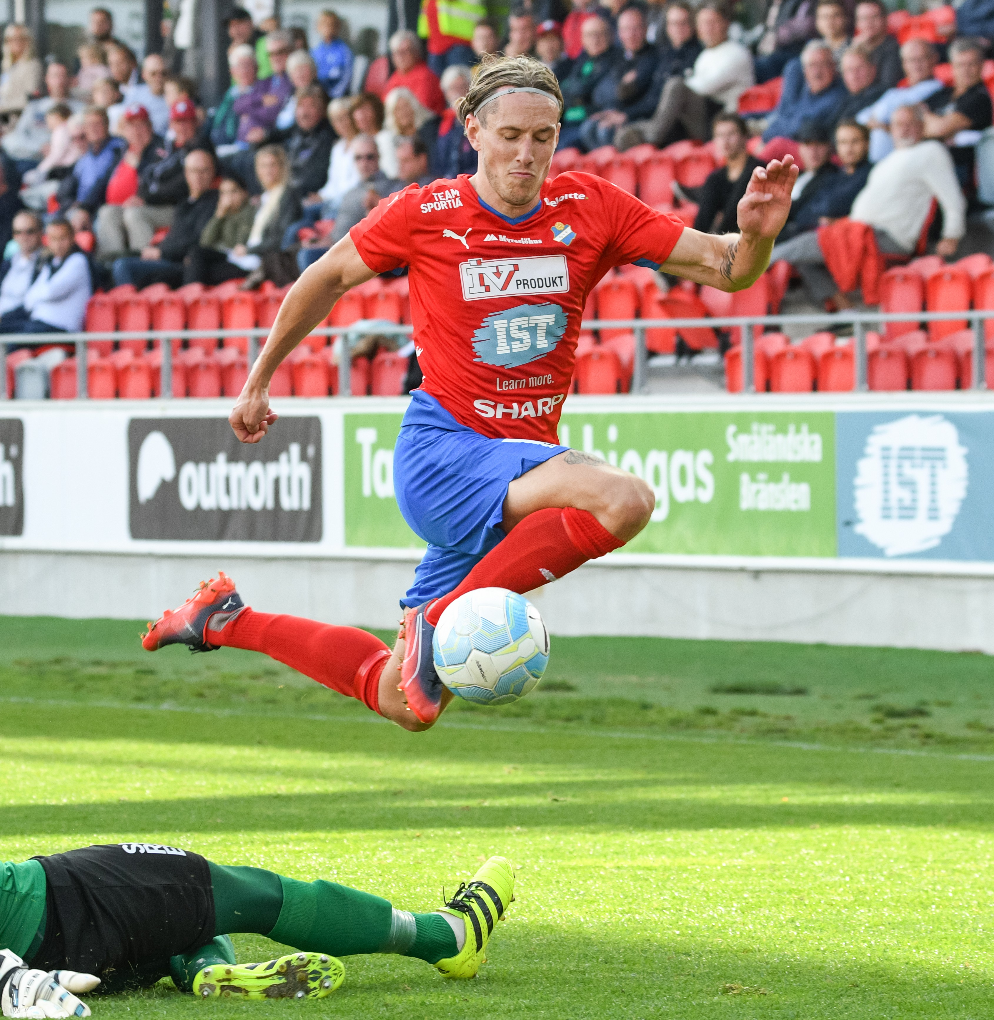 Den svenske anfallaren David Johannesson rundar målvakten i Östers 5-0 seger mot Trollhättan i september 2016